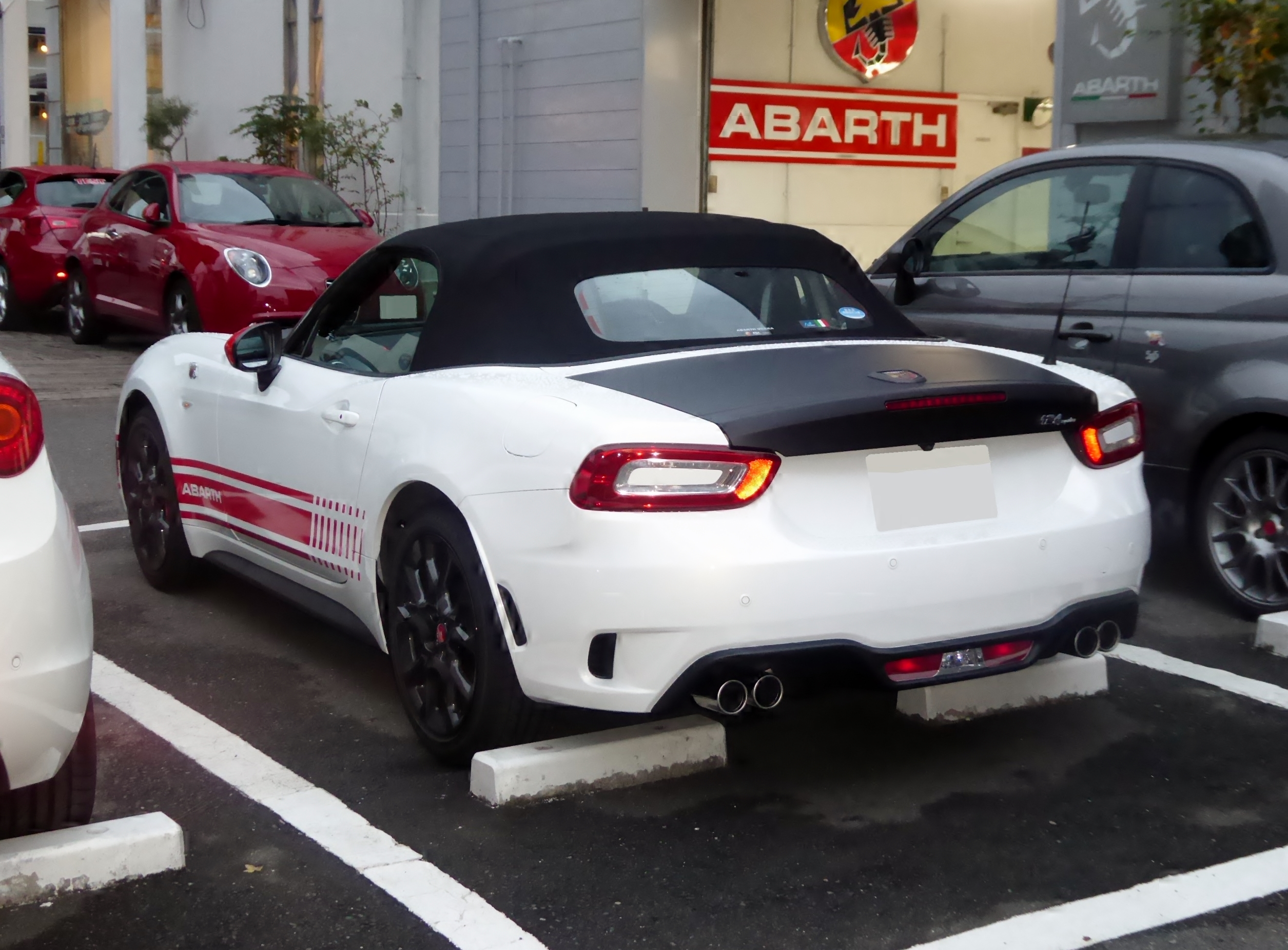 アバルト・124スパイダーのアバルト大阪東デモカー仕様をリアから撮影。